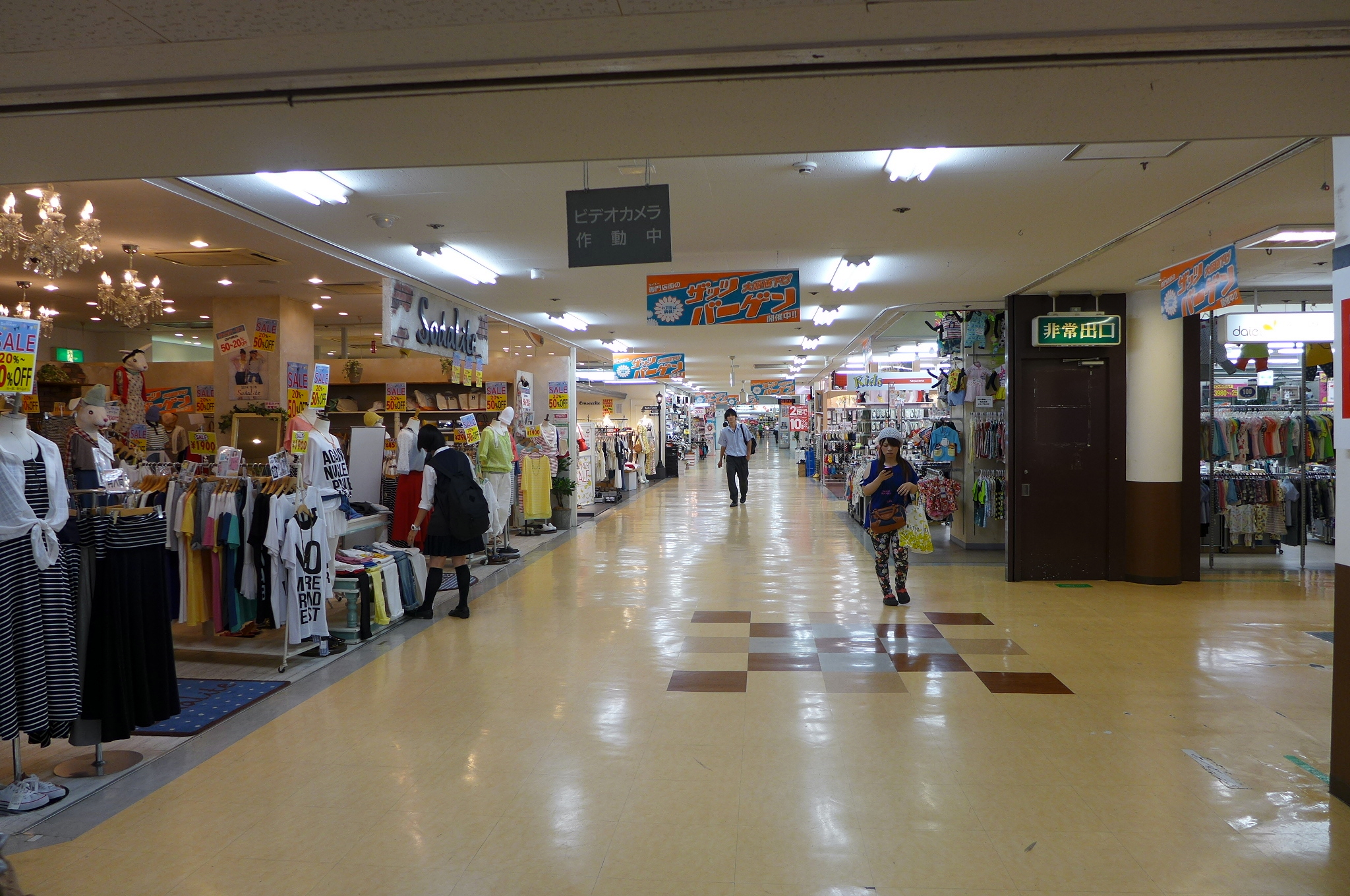 Daiei Kyobashi Interior